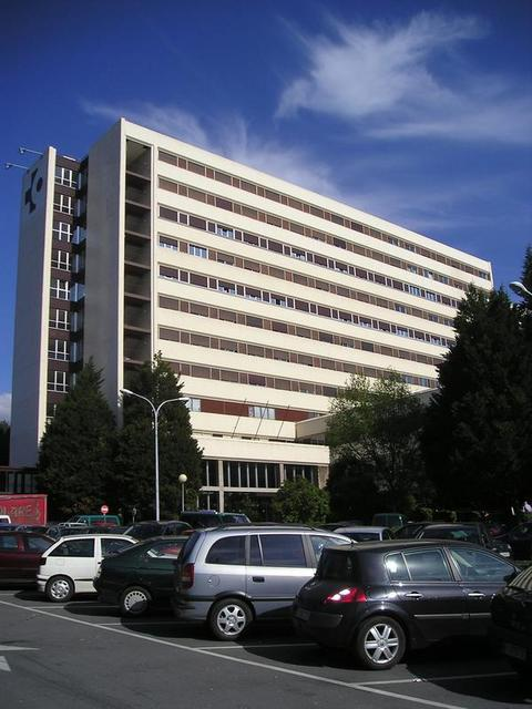 Galdakaoko Ospitalea